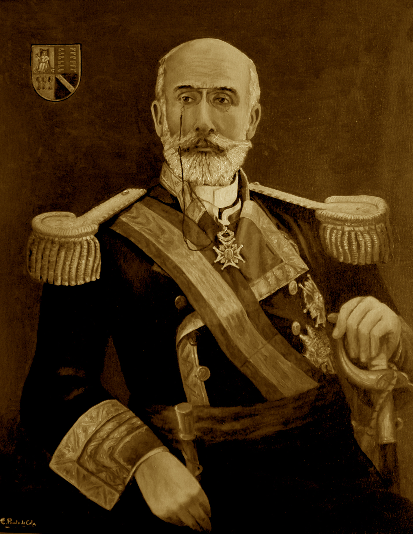 Leandro de Saralegui y Medina (Tui, Pontevedra, 1839 - Ferrol, Corunya, 1910), marí, historiador i acadèmic galleg. — Leandro de Saralegui y Medina (Tuy, Pontevedra, 1839 - Ferrol, Coruña, 1910), marino, historiador y académico gallego.